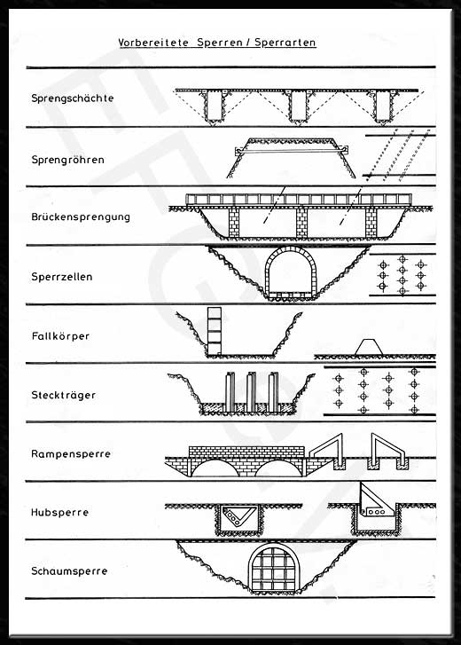 Skizzen einiger an der ehemaligen innerdeutschen Grenze verwandten Sperranlagen. Das Bild zeigt den Aufbau einiger im Kalten Krieg verwendeter Arten von Straßensperranlagen, die zum Verlangsamen der gegnerischen Offensive gedacht war. Es handelt sich bei dem gezeigten Werk um ein militärhistorisches Dokument der Bundeswehr